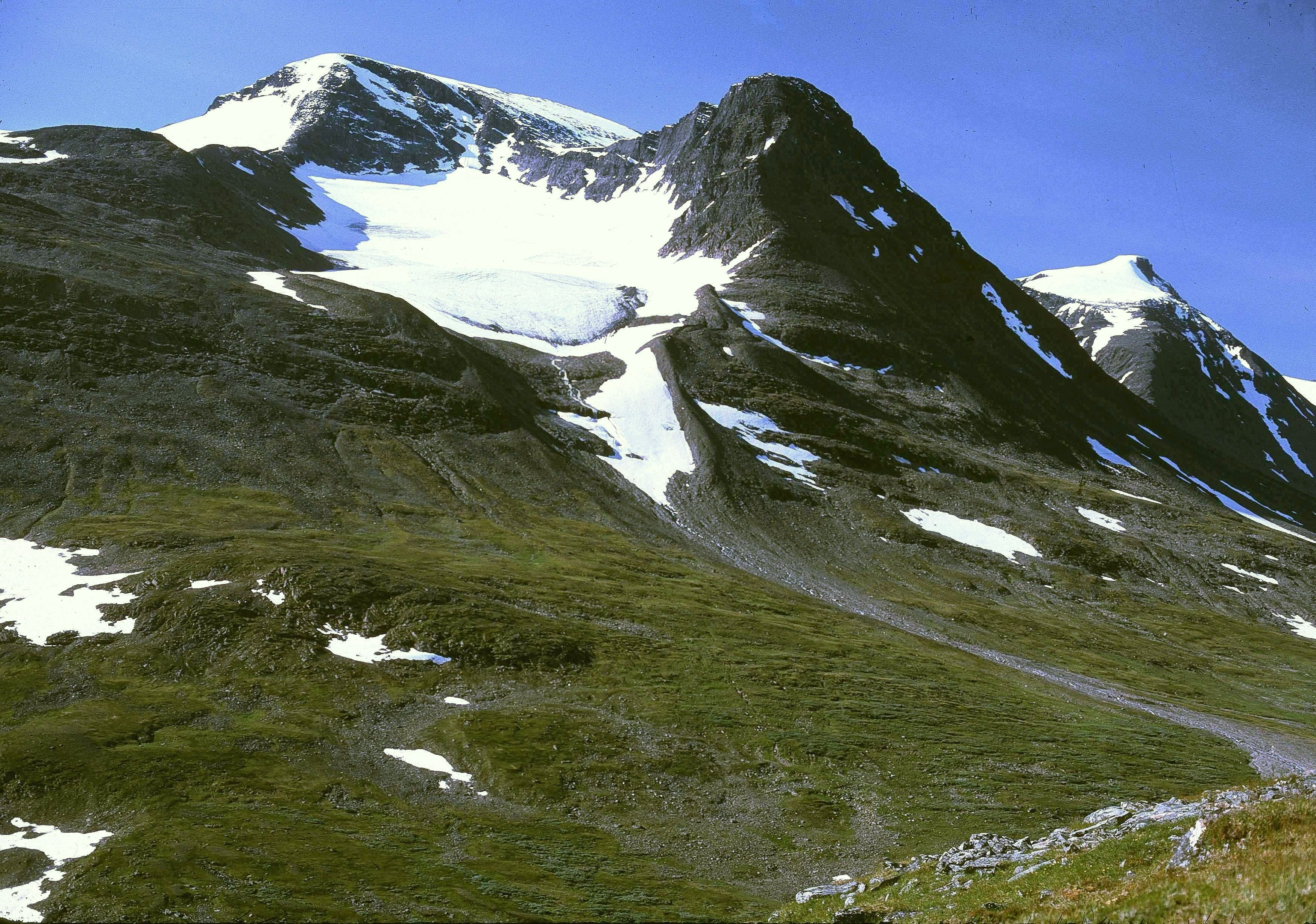 Skårvatjåkko i Sarek